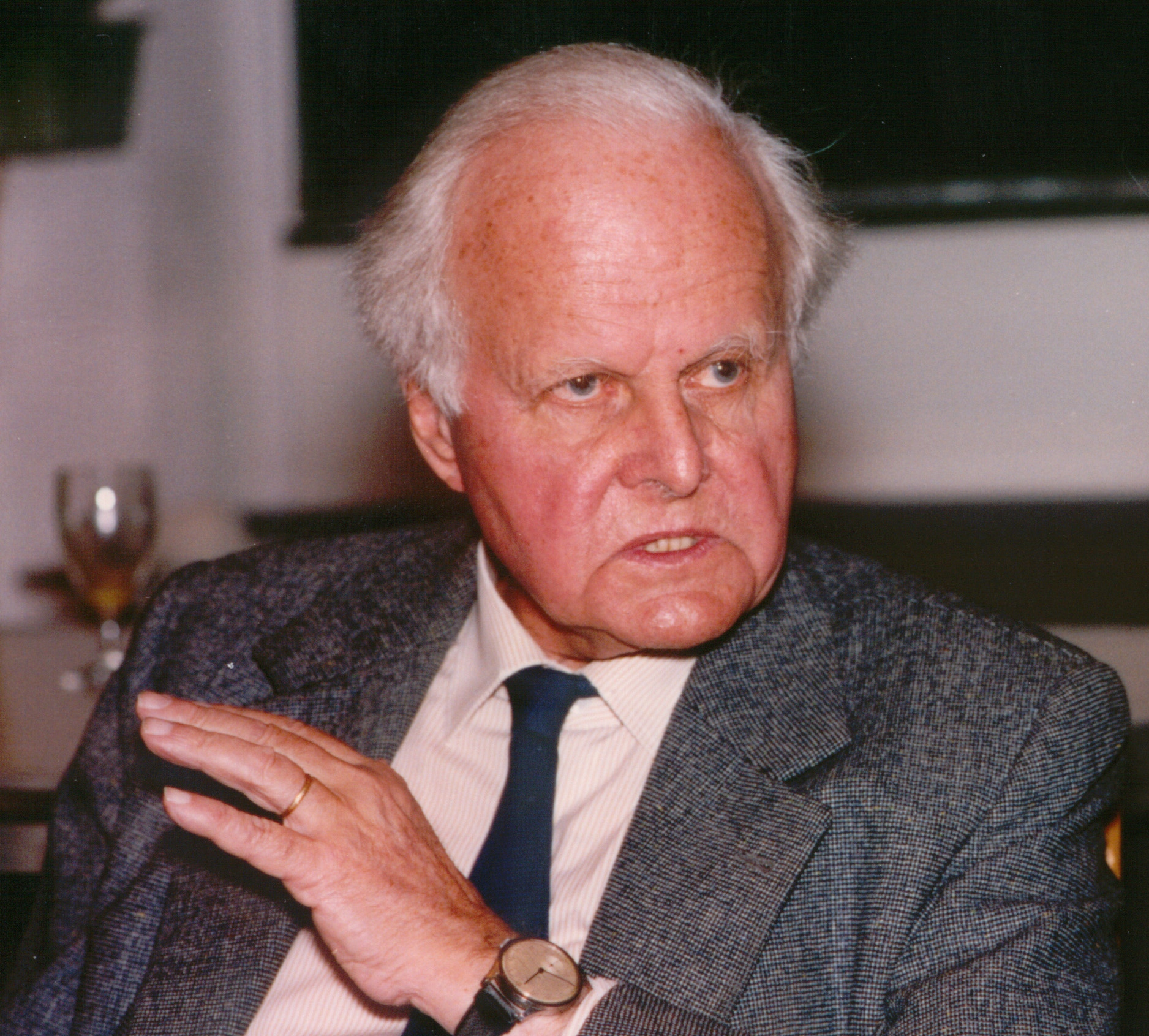 Carl Friedrich von Weizsäcker, Göttingen DPI